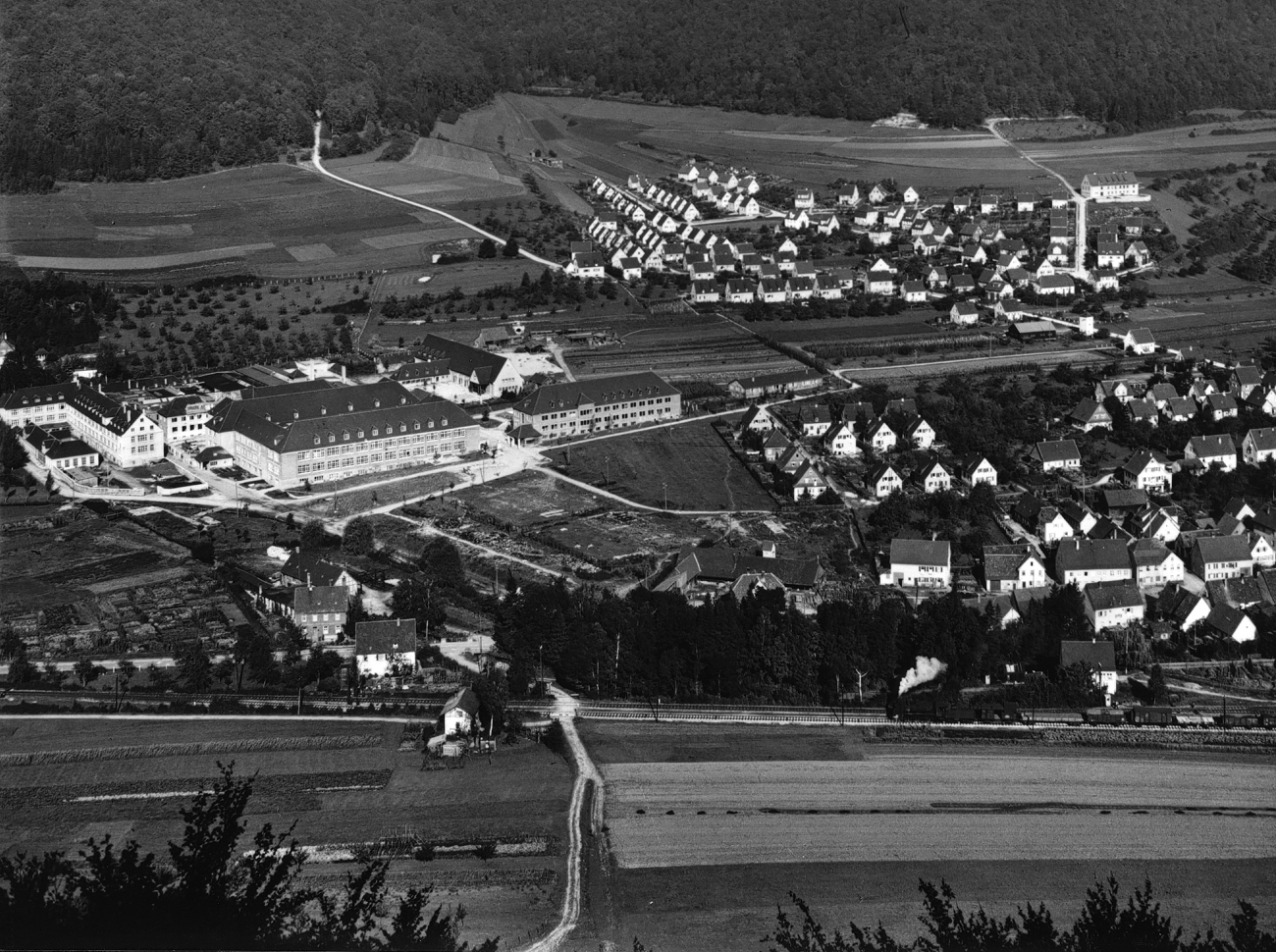 Карл Цайс в Оберкохен през 1946